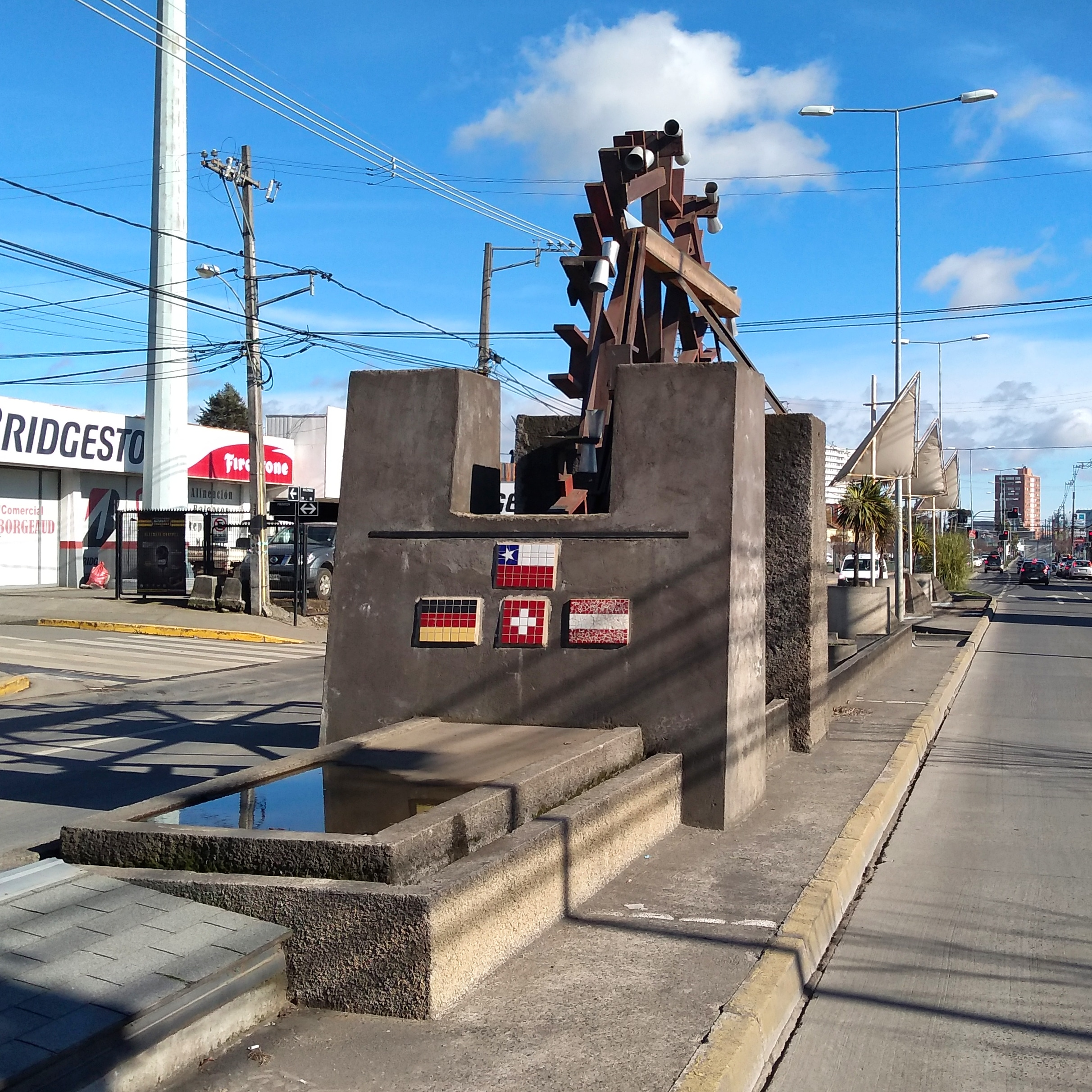 Monumento conmemorativo a los colonos alemanes, suizos y austriacos de Los Ángeles, Región del Biobío, Chile. Inaugurado en 2011 en conmemoración a los 150 años de la colonización germánica en la ciudad.